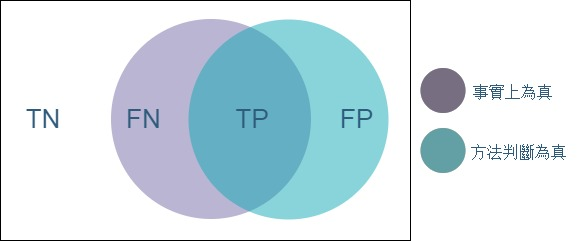 中文（台灣）: F-score 的 precision rate 與 recall rate 的關係的范恩圖